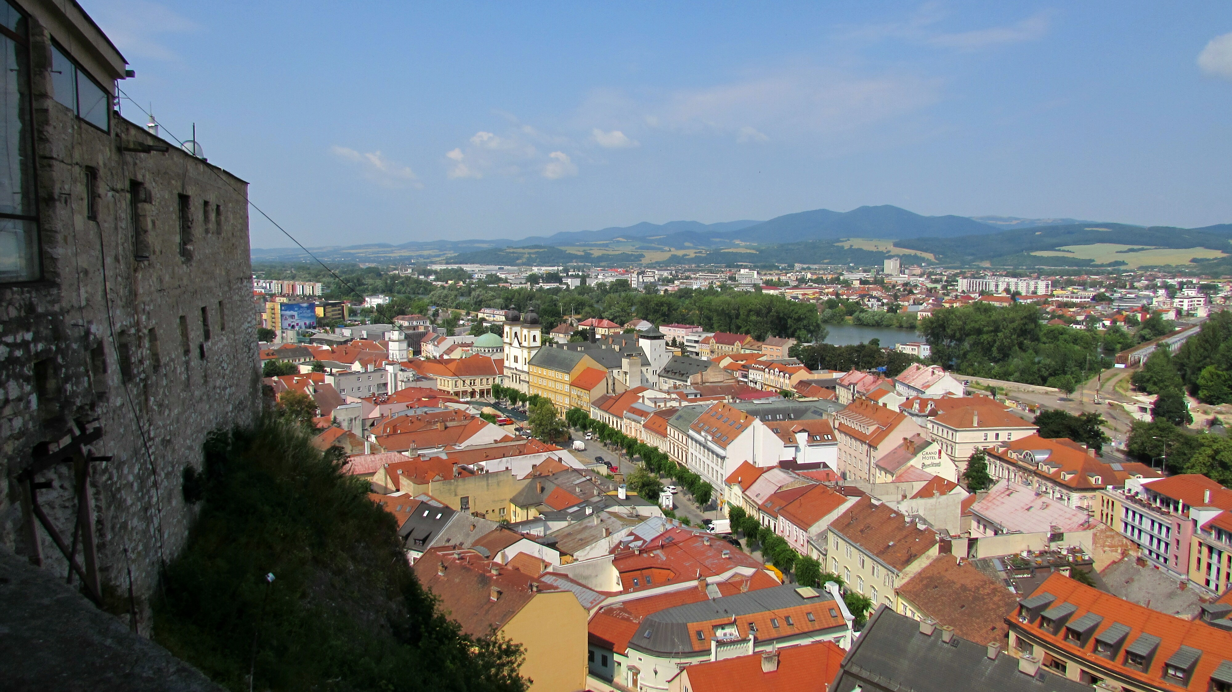 Trencin Ansicht-2